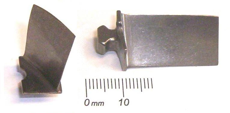 titanium compressor-blade